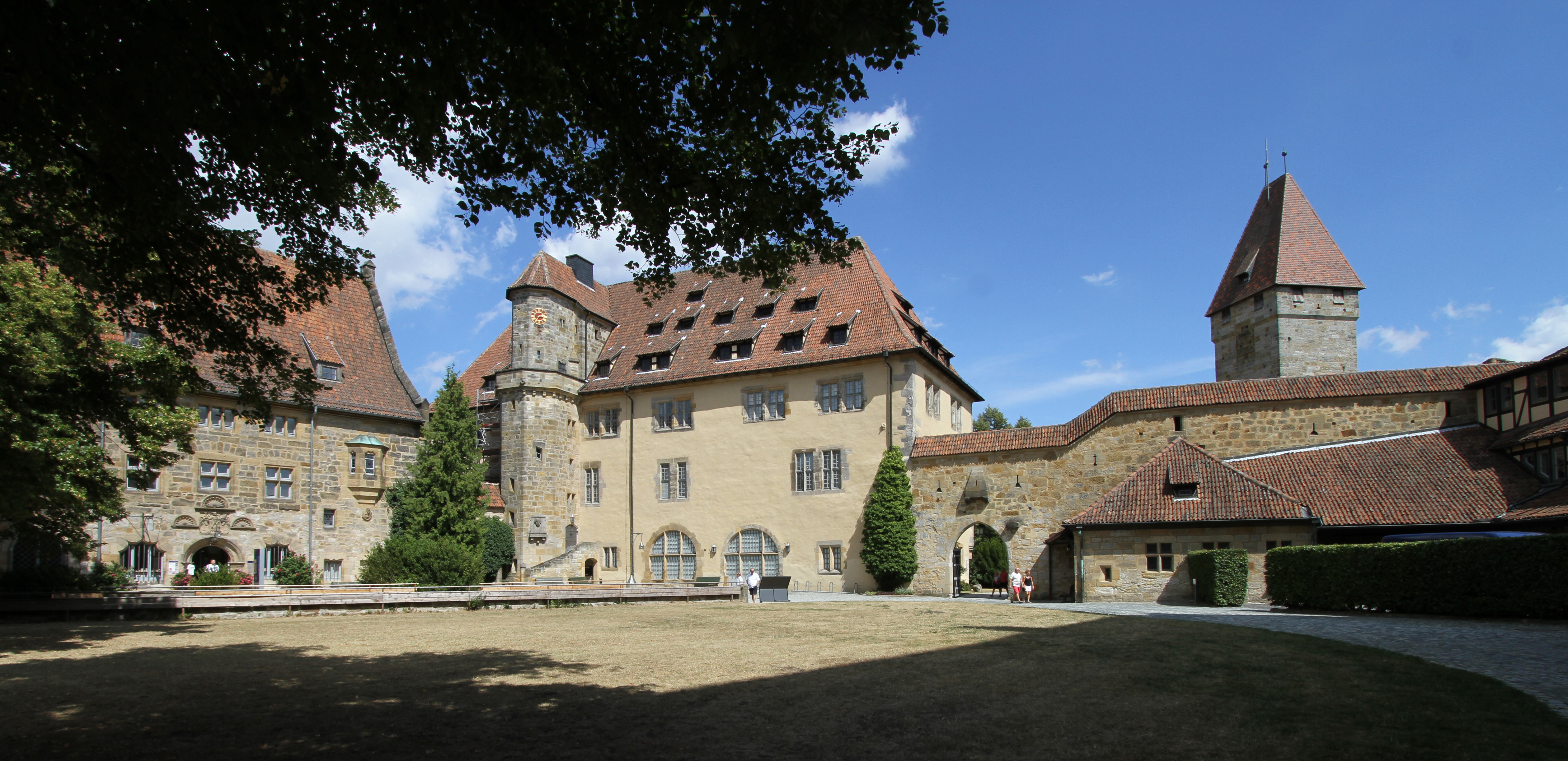 Veste Coburg